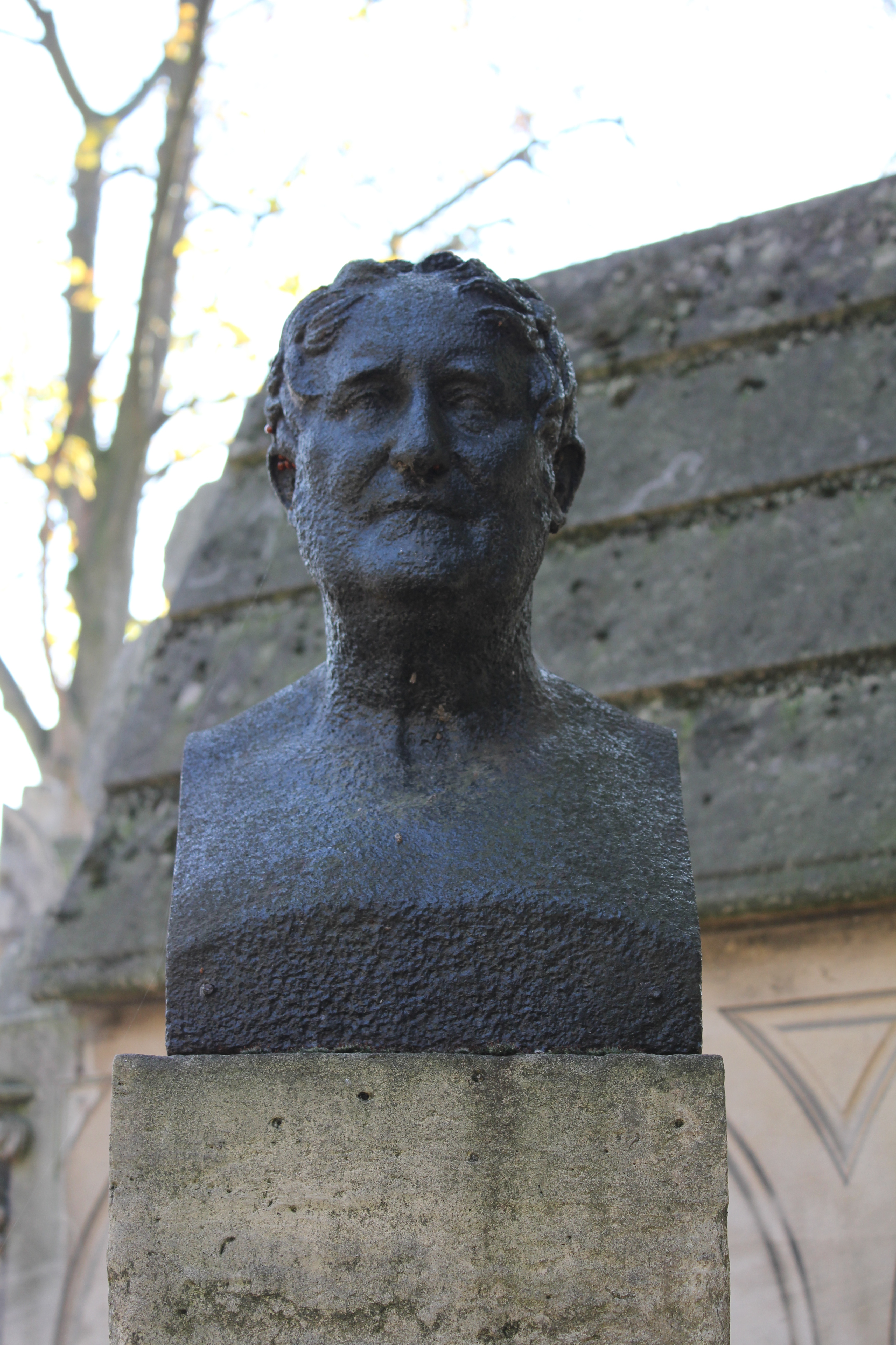 buste, face avant